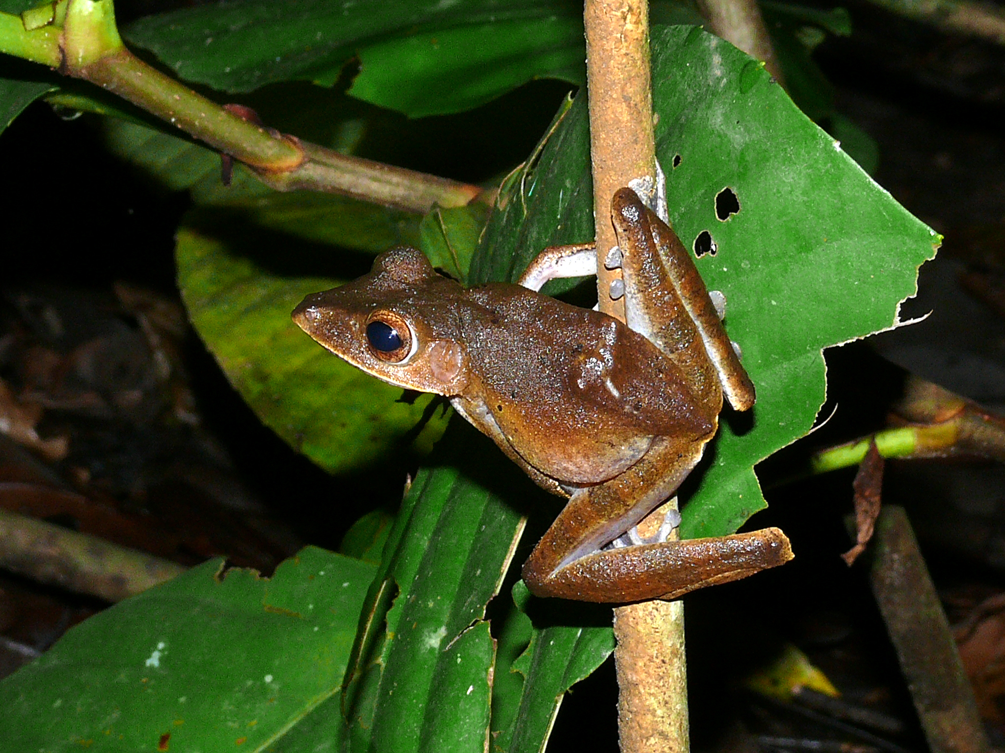 Bako NP, Sarawak, MALAYSIA